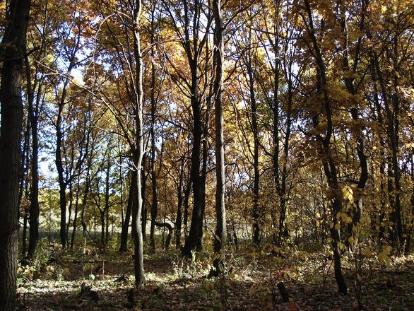 В Ахмеровском лесу